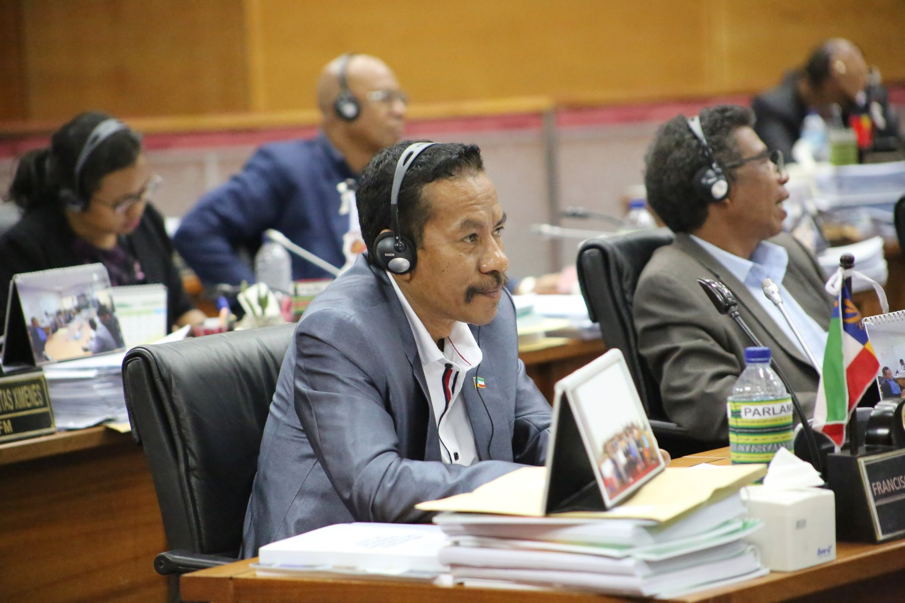 Francisco David Xavier Carlos in einer Sitzung im Nationalparlament Osttimors